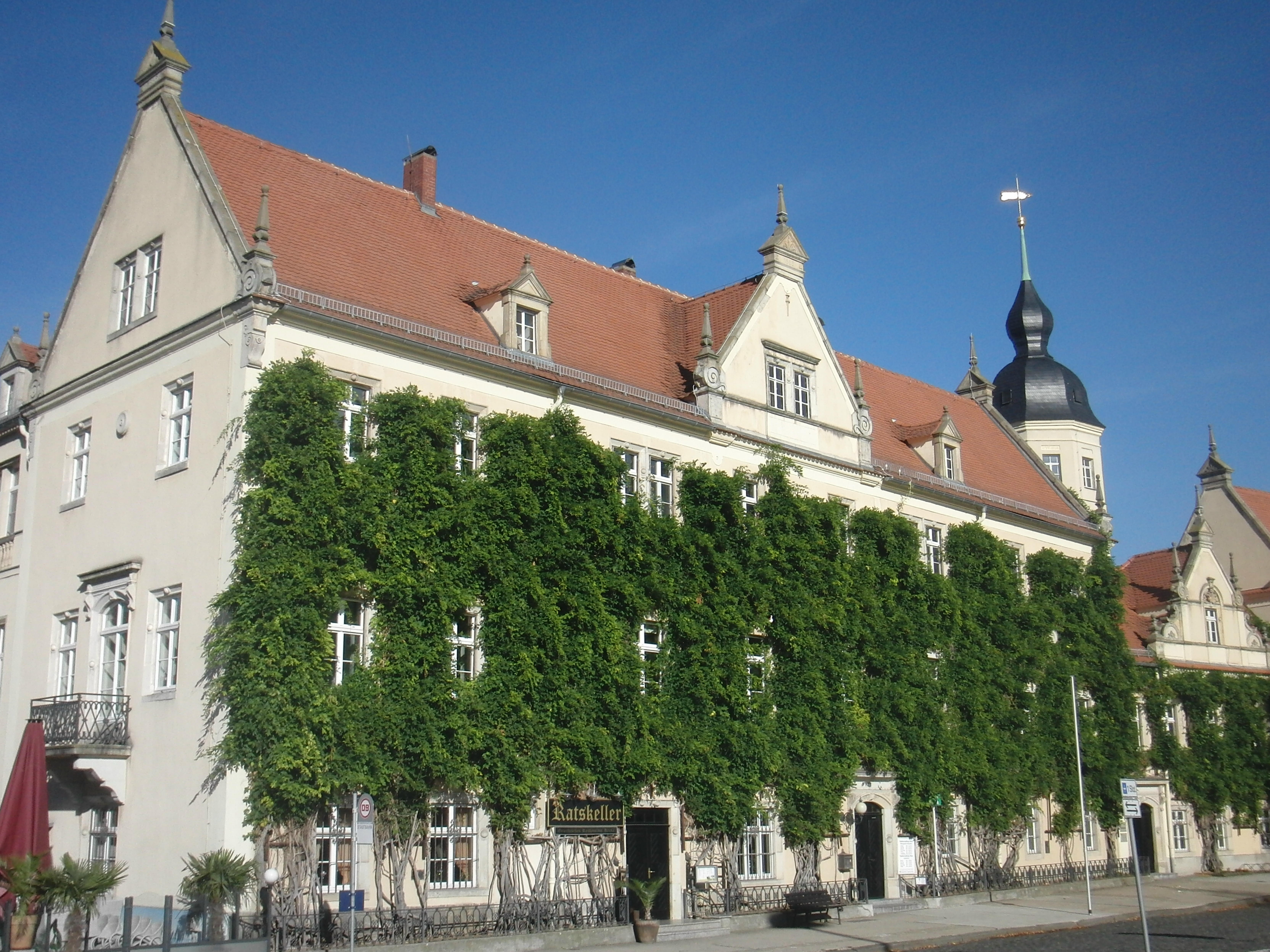 Rathaus Riesa